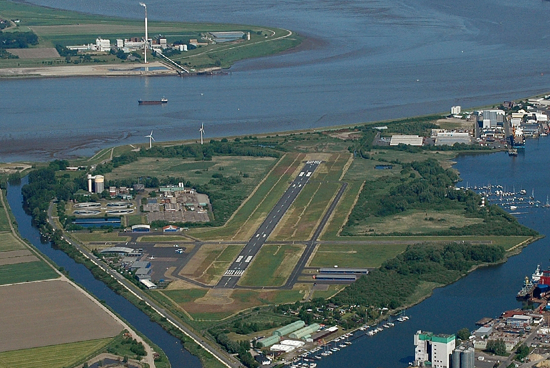 Flughafen Bremerhaven (EDWB) / Fotoflug vom Flugplatz Nordholz-Spieka über Cuxhaven und Wilhelmshaven